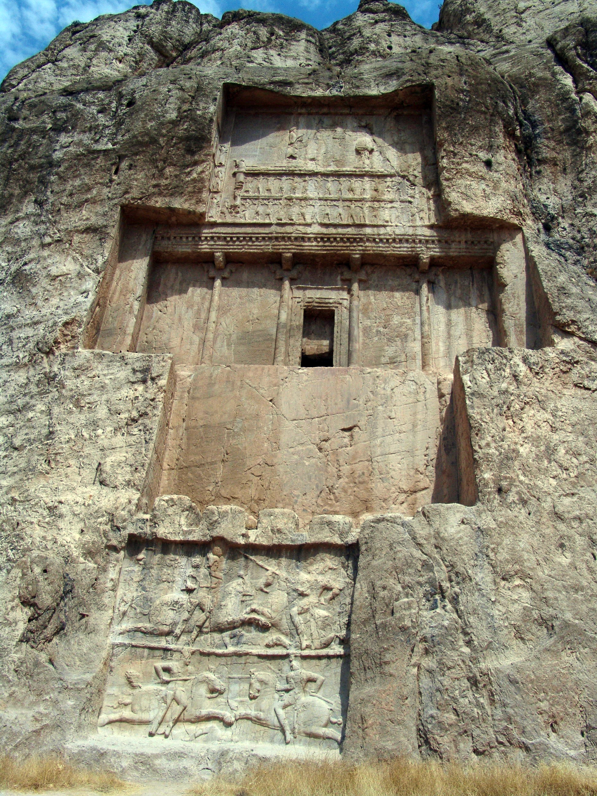 آرامگاه داریوش بزرگ (بالا) نبرد هرمز دوم (پایین) در نقش رستم، مرودشت، فارس، ایران